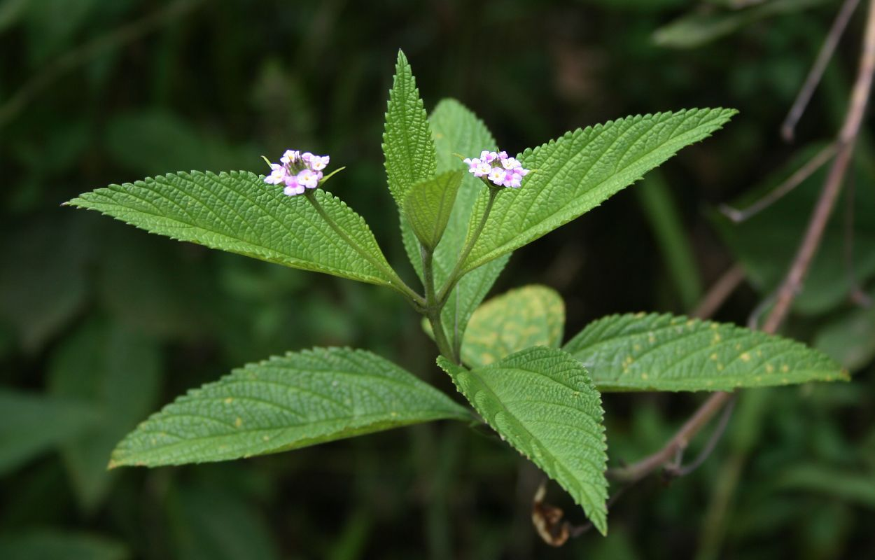 Lantana trifolia, Eisenkrautgewächse (Verbenaceae) - Costa Rica: Prov. Puntarenas, La Gamba NW Golfito, Valle Bonito